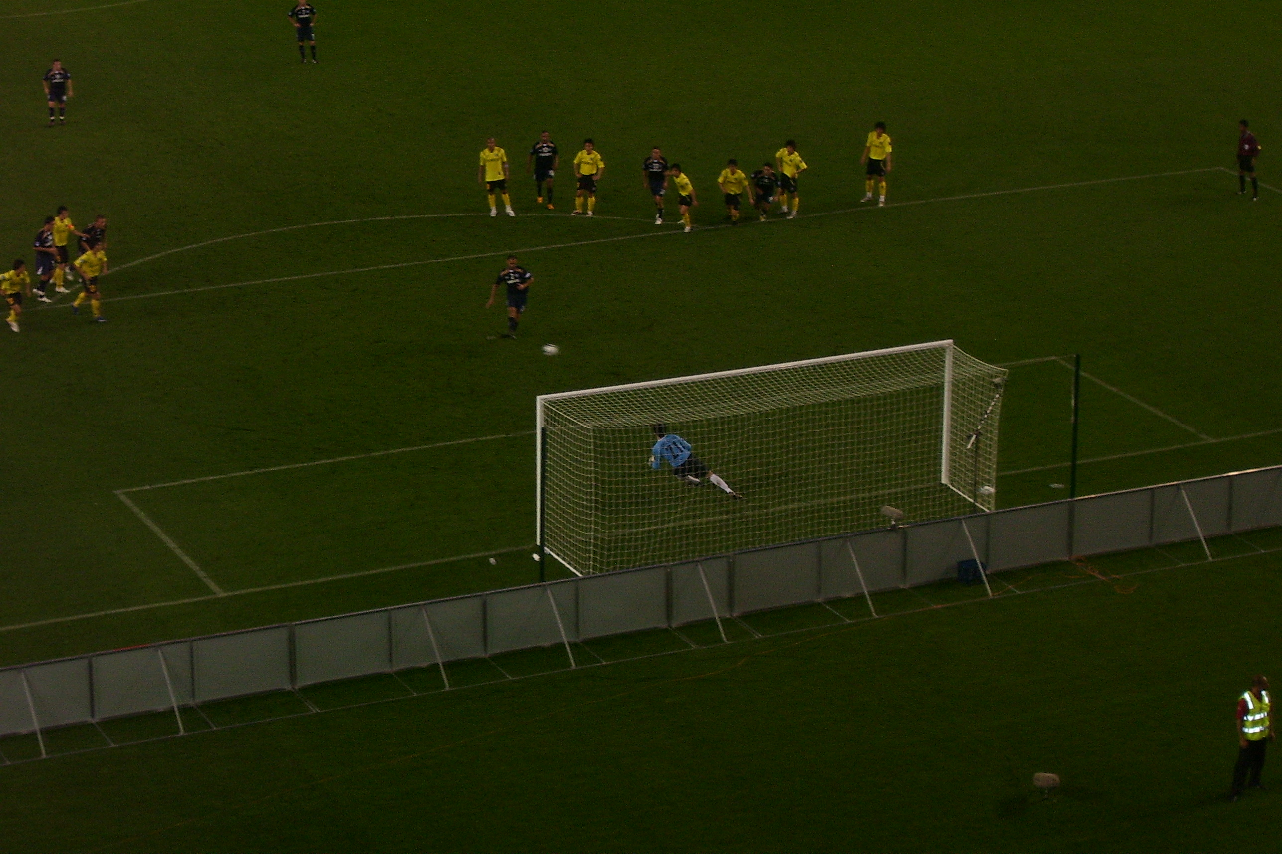 Against Chunnam Dragons